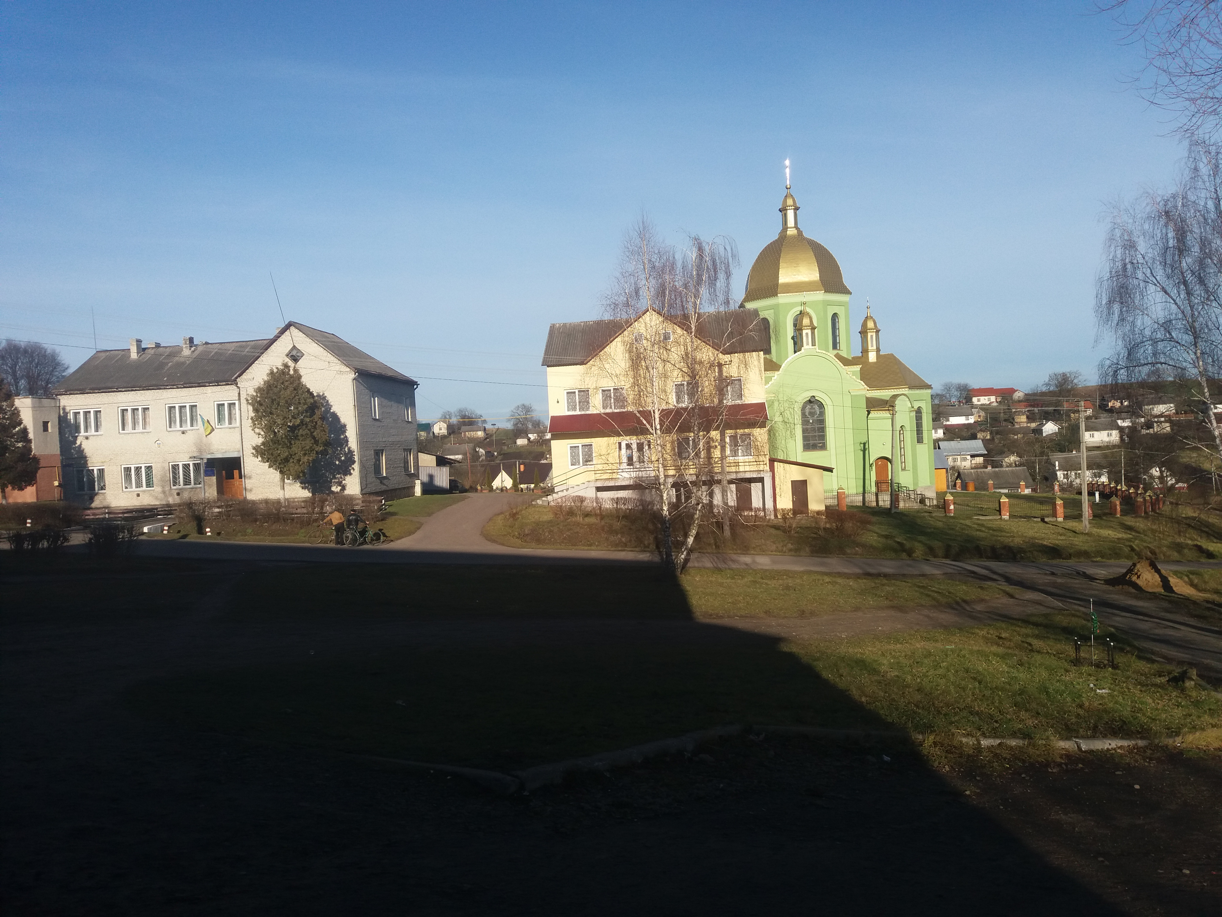 Віжомля